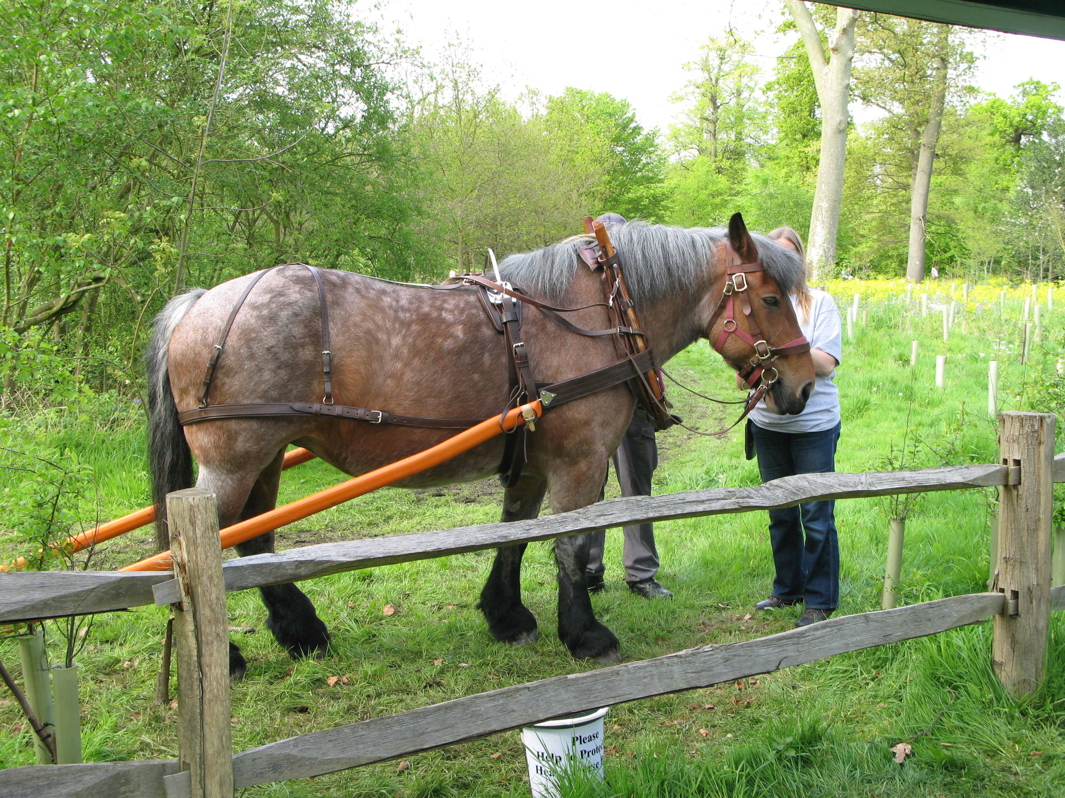 ardennes horse